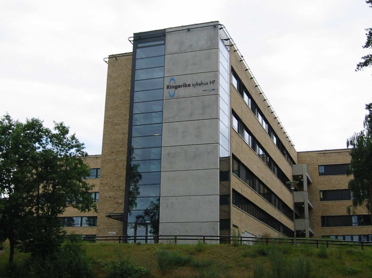 Ringerike sykehus HF (Hospital), Hønefoss, Ringerike, Norway